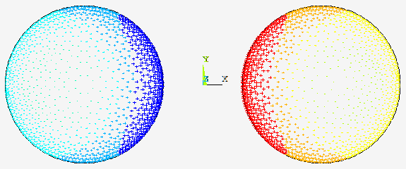 Zjawisko zbliżenia w dwóch okrągłych przewodach miedzianych przy 20 kHz i prądach o amplitudzie 10A płynących w przeciwnych kierunkach (średnica przewodów 2 mm)UnknownUnknown proximity effect in two copper wires at 20 khz and current with amplitude of 10 a flowing in oposite directions (wire diam. 2 mm)